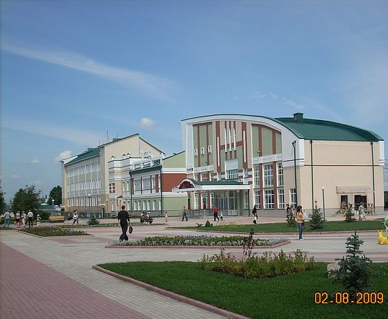 Привокзальная площадь пгт. Промышленная